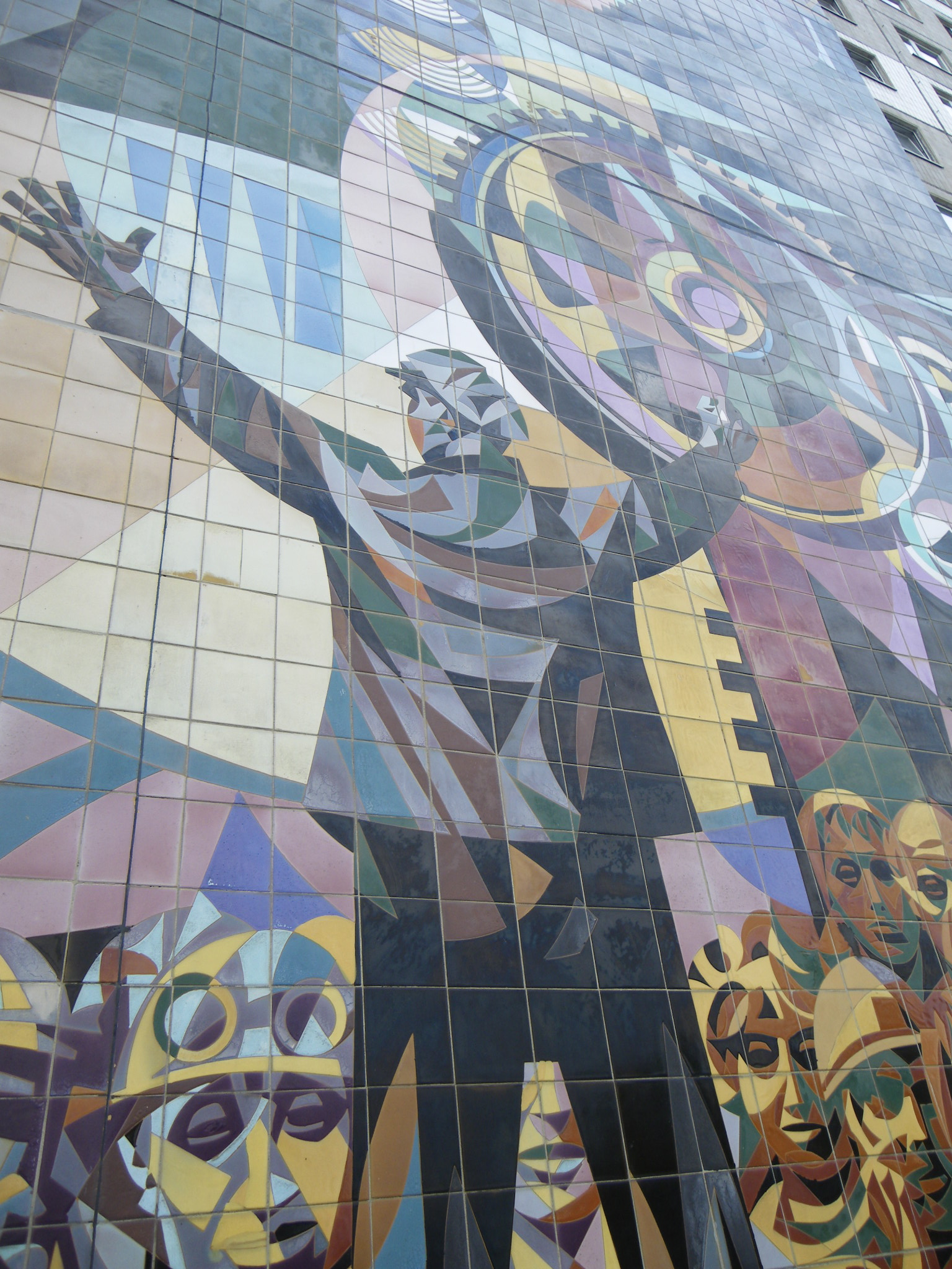 José Renau (auch Josep Renau) (1907-1982), Die vom Menschen beherrschten Kräfte von Natur und Technik, Entwurf 1971/72, Realisierung I. Schulz 1974, Majolikamalerei auf Steinzeugfliesen Am Stadion 5 (Detail der linken Bildtafel)